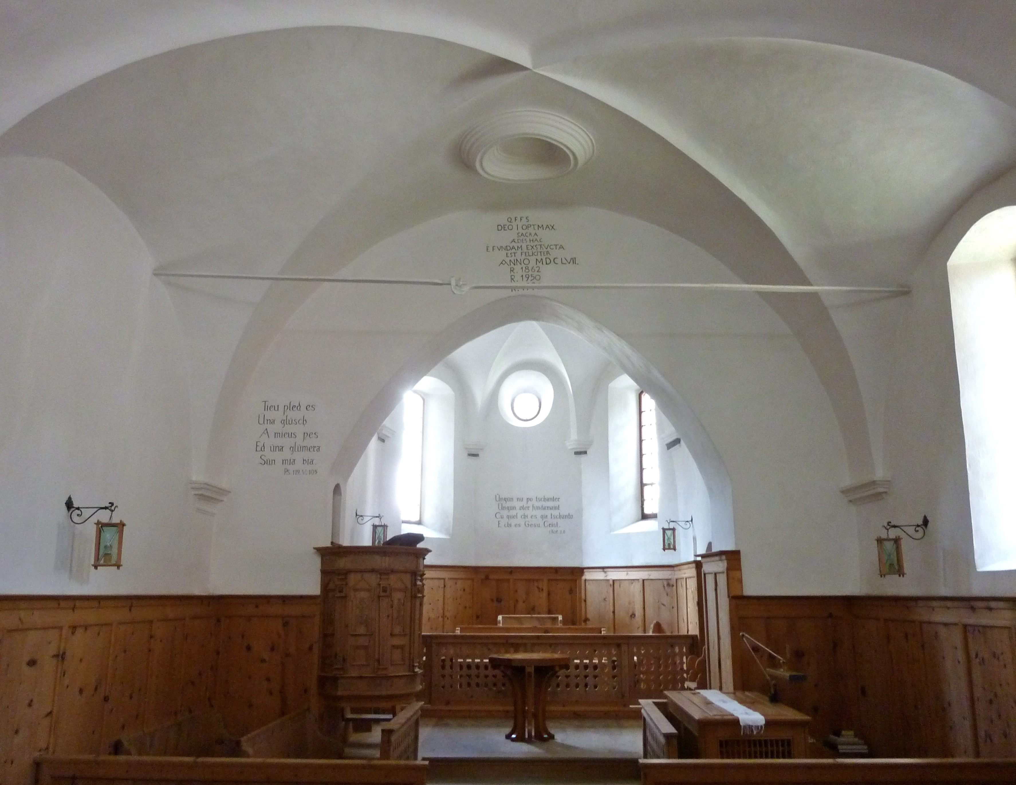 Reformierte Kirche Latsch GR: Chor